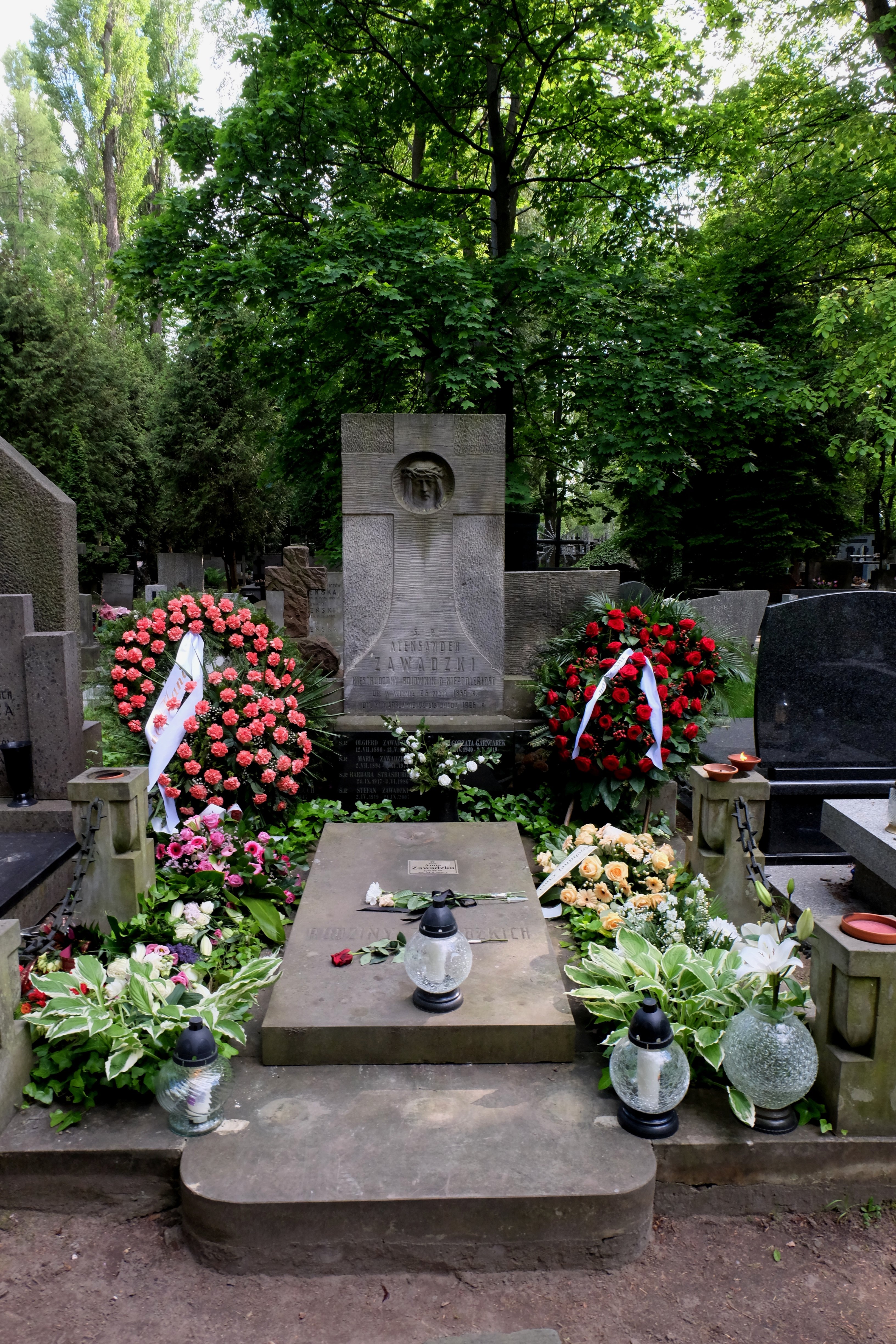 Grób działacza politycznego Aleksandra Zawadzkiego i prof. Anny Zawadzkiej na Cmentarzu Wojskowym na Powązkach w Warszawie